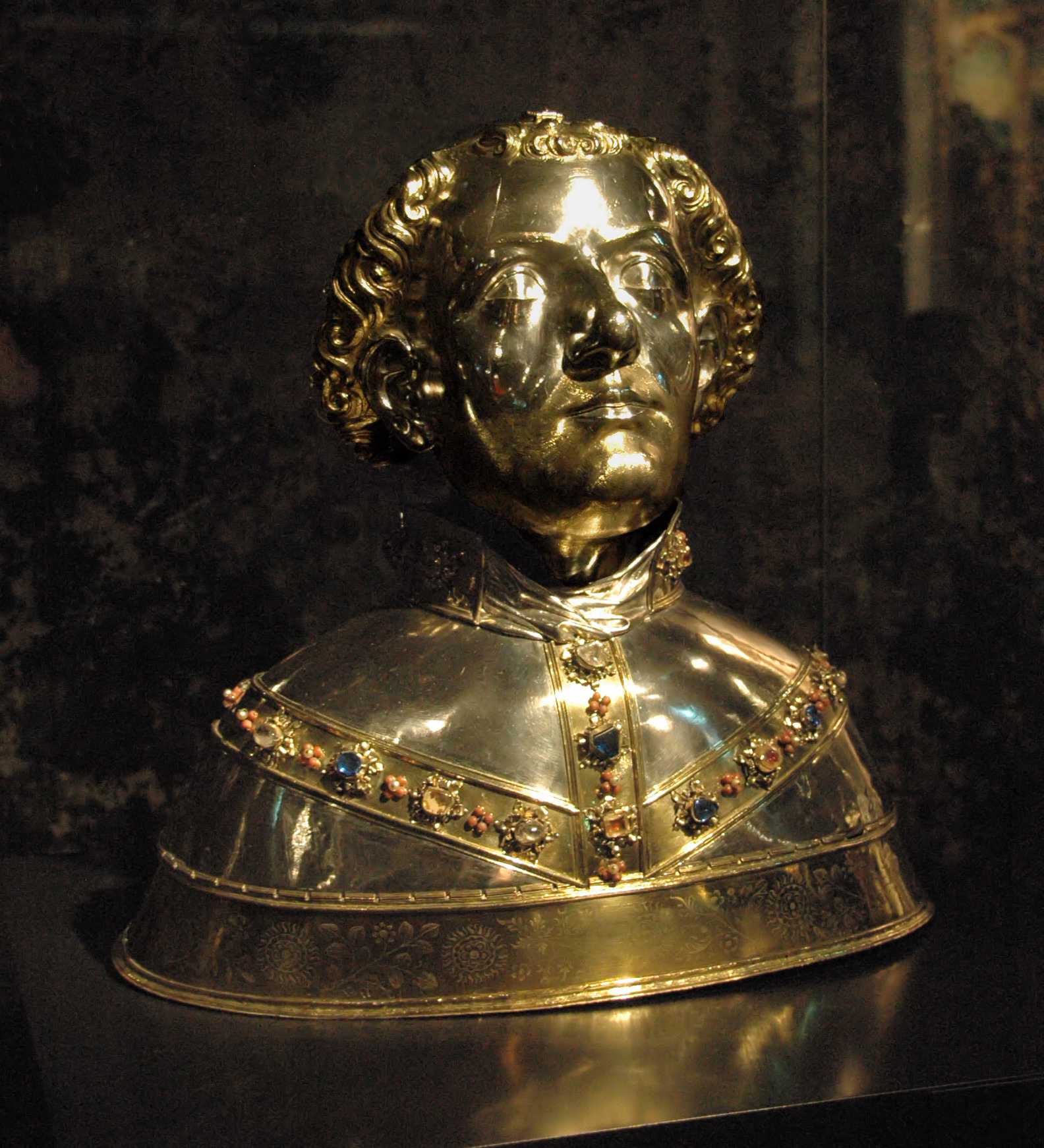 Kopfreliquiar des heiligen Marsus aus dem Essener Domschatz